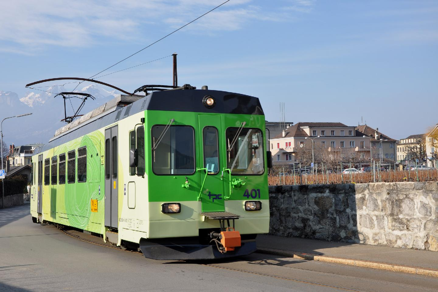 Triebwagen BDe 4/4 401 der ehemaligen Aigle–Sépey–Diablerets-Bahn (ASD), auf der Bahnstrecke Aigle–Sépey–Diablerets zwischen Place-du-marché ASD und Aigle-Dépôt ASD, im neuen einheitlichen Anstrich der Transports Publics du Chablais (TPC), im Winter 2011, Ausgangs Aigle.